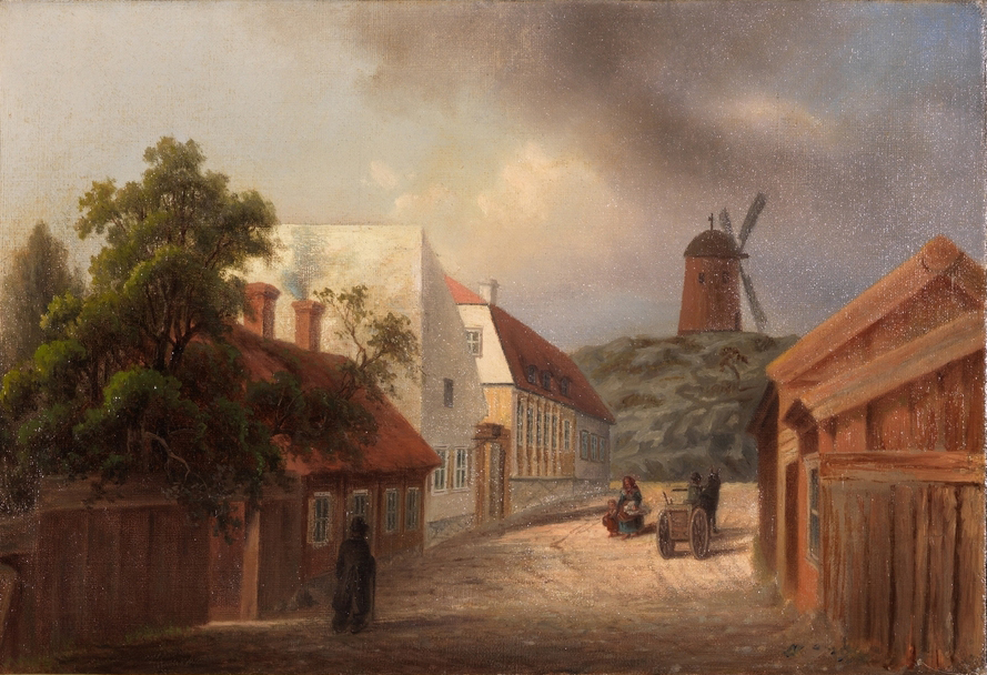 Kammeckerska malmgården vid Seved Bååtsgatan 33/Nybrogatan 75. Närmast till vänster syns mjölnarens hus och rakt fram Tyskbagarbergen med Kammeckerkvarnen